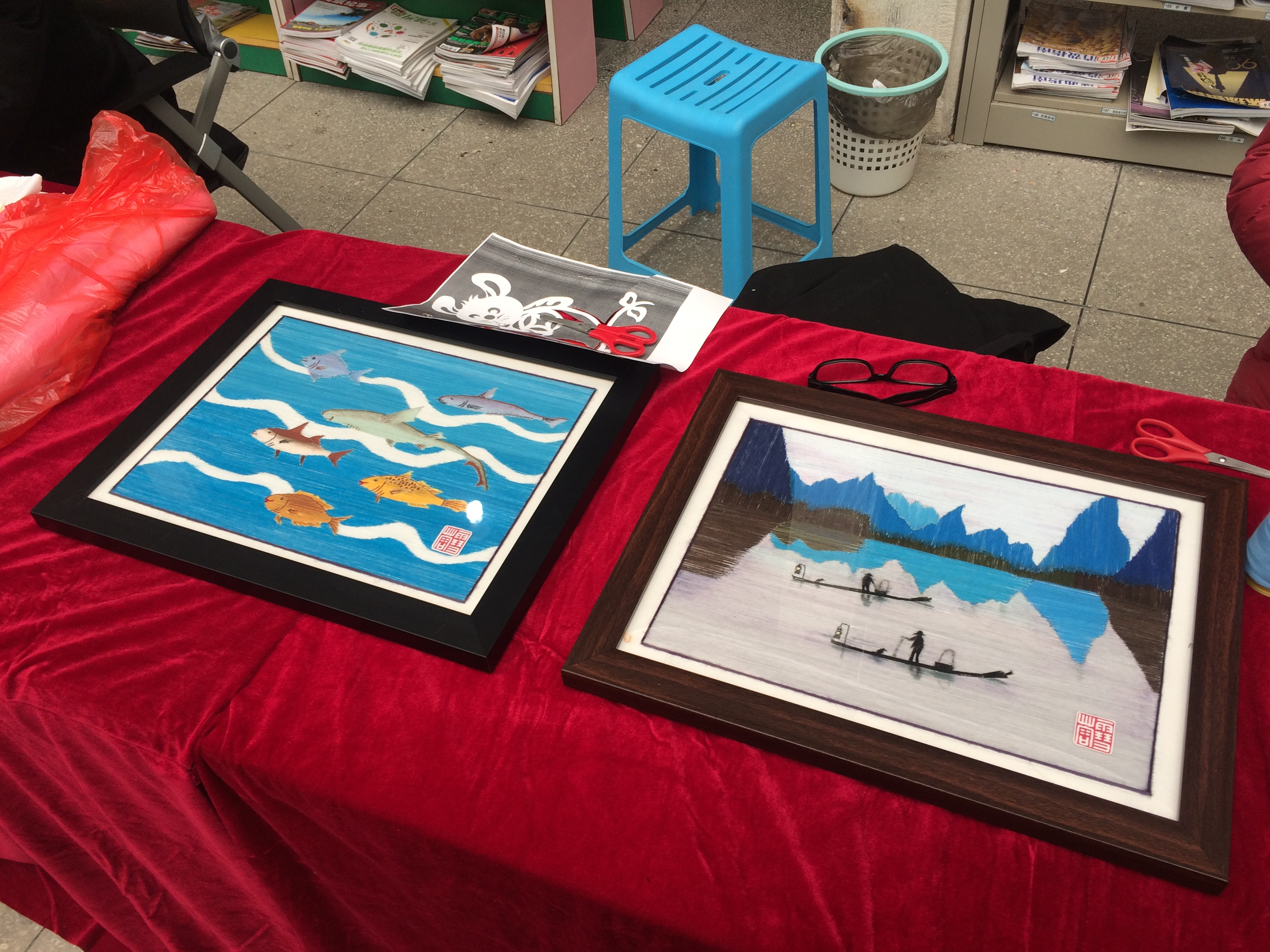 中文（中国大陆）: 玉环渔民画